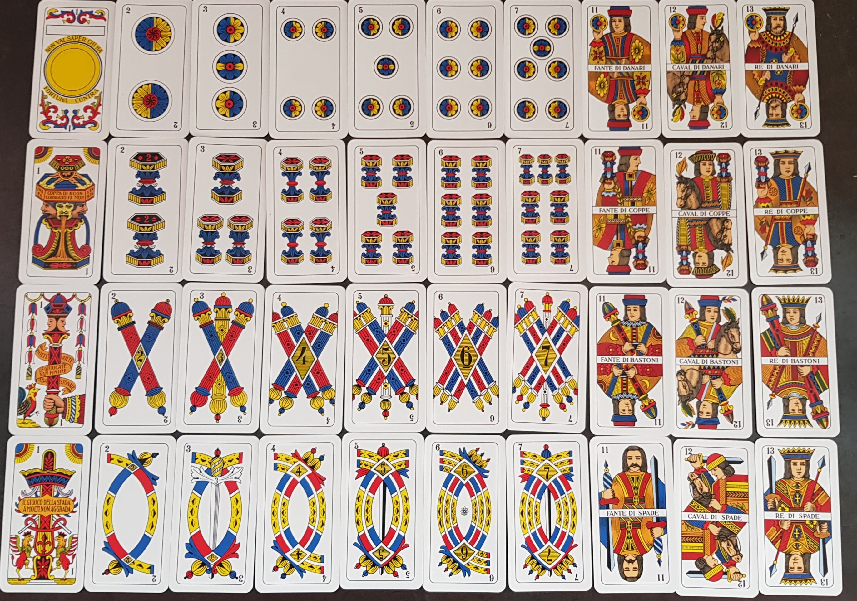 Mazzo triestino da 40 carte